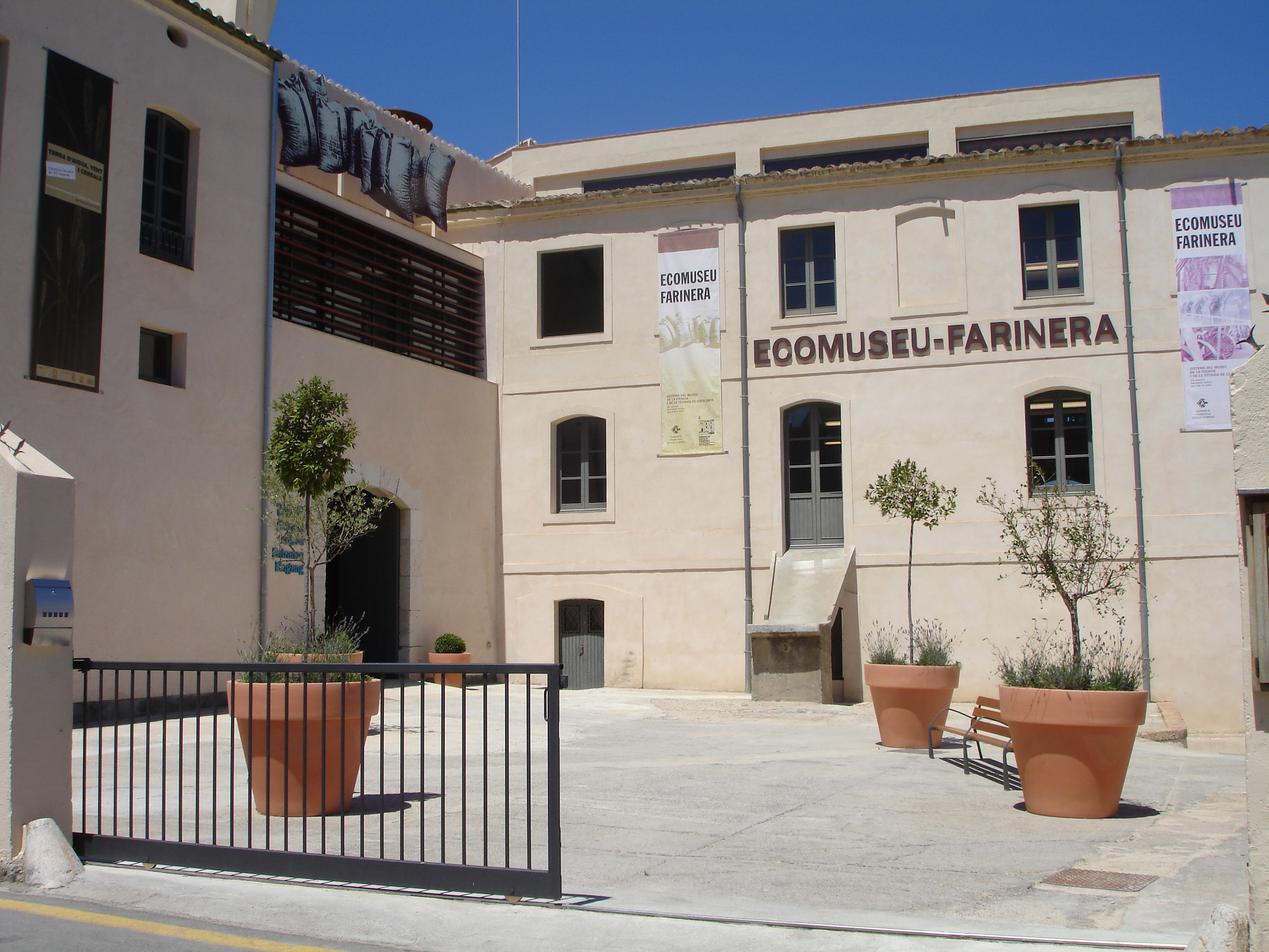 Façana principal de l'Ecomuseu-Farinera de Castelló d'Empúries